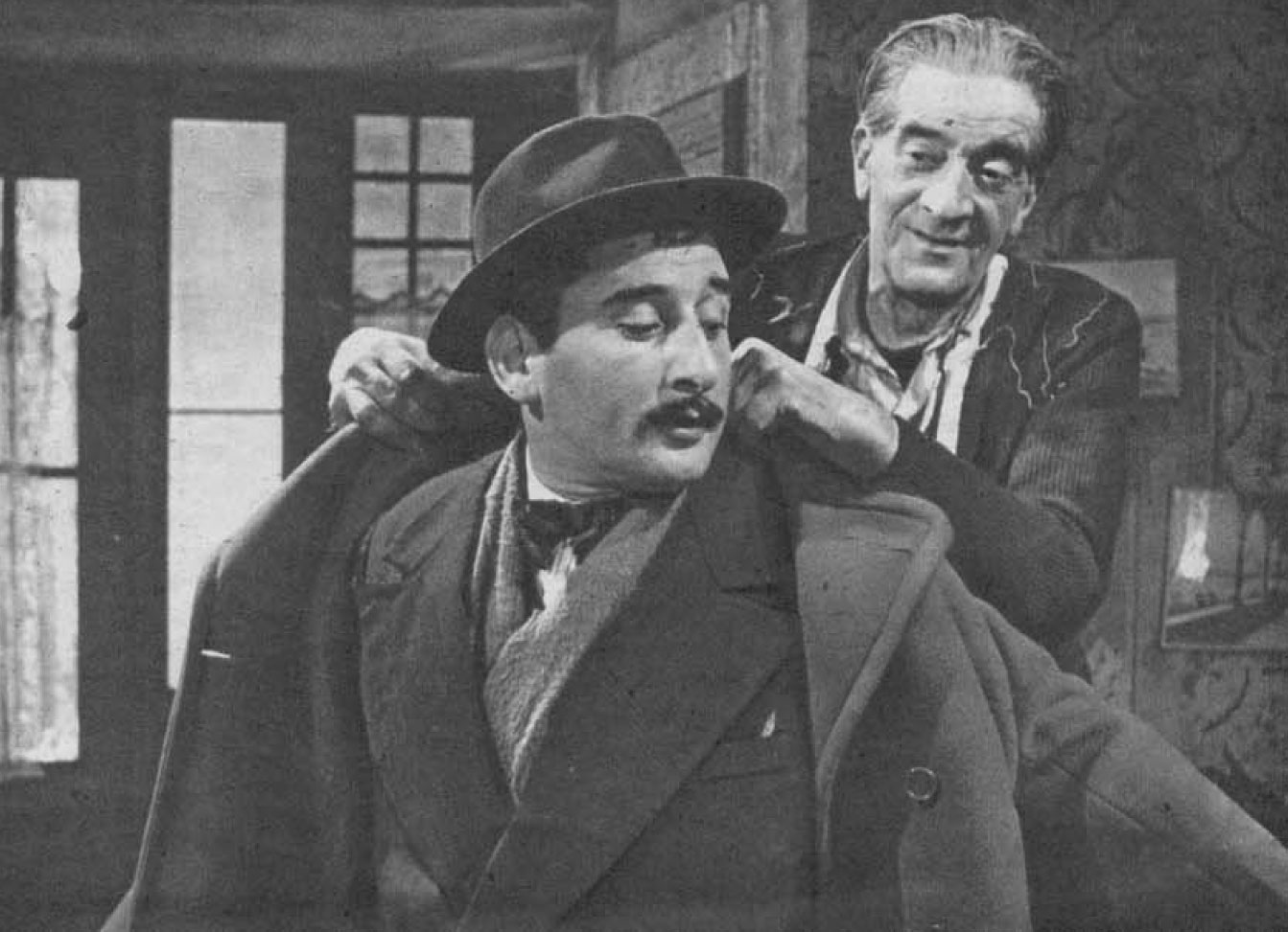 Renato Rascel e Giulio Calì ne "Il cappotto" (Lattuada, 1952)